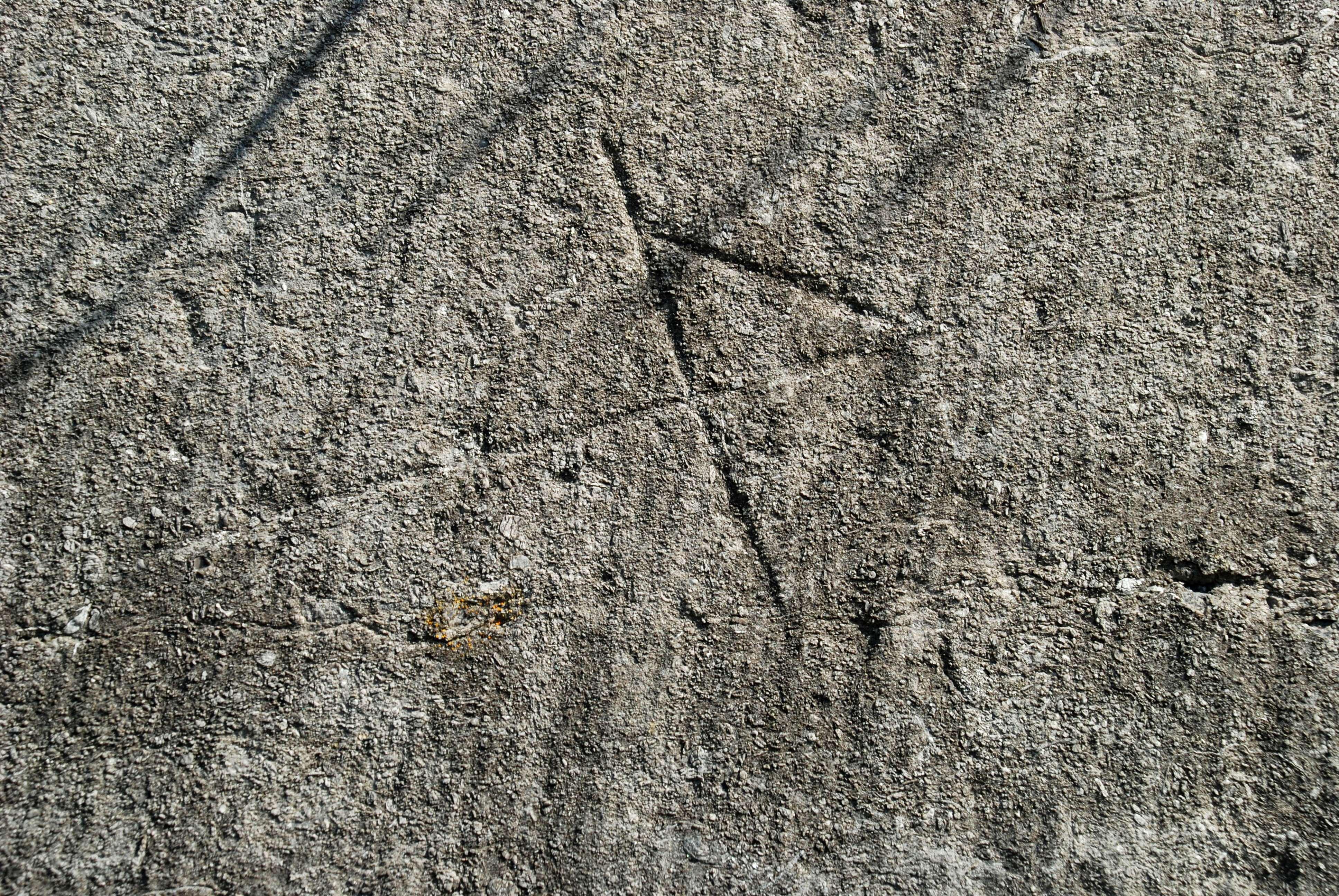 Belgique - Brabant wallon - Court-Saint-Étienne - Église Saint-Étienne